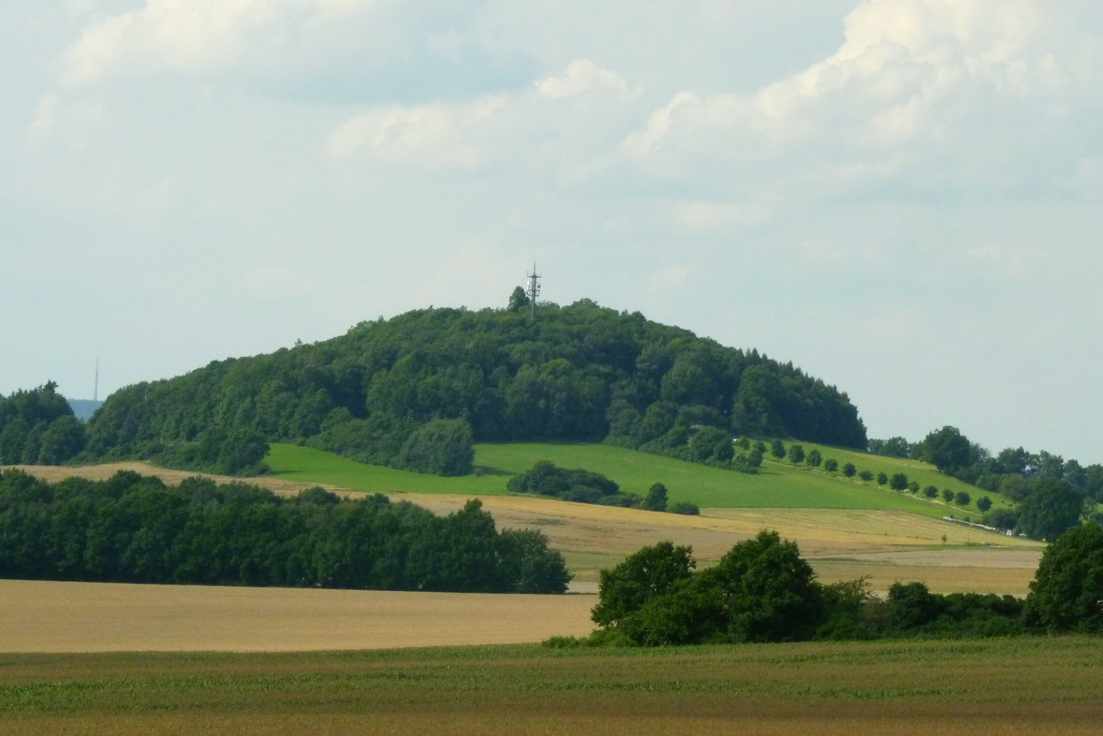 Der Große Berg in Großhennersdorf von Schanzberg in Oberseifersdorf aus gesehen.